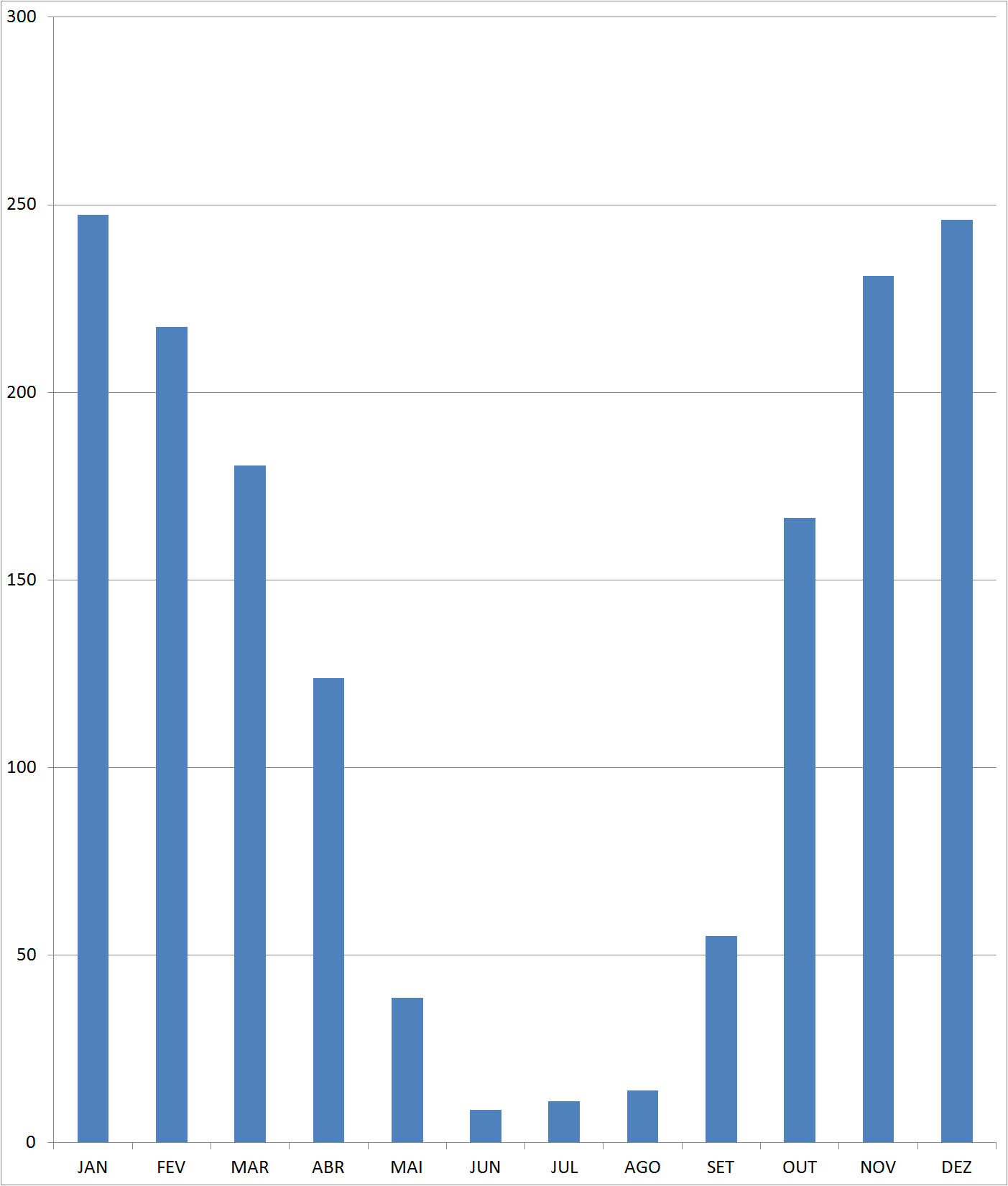 Climatologia de precipitação de Brasília - Distrito Federal, Brasil. INMET, normal climatológica de 1961-1990.